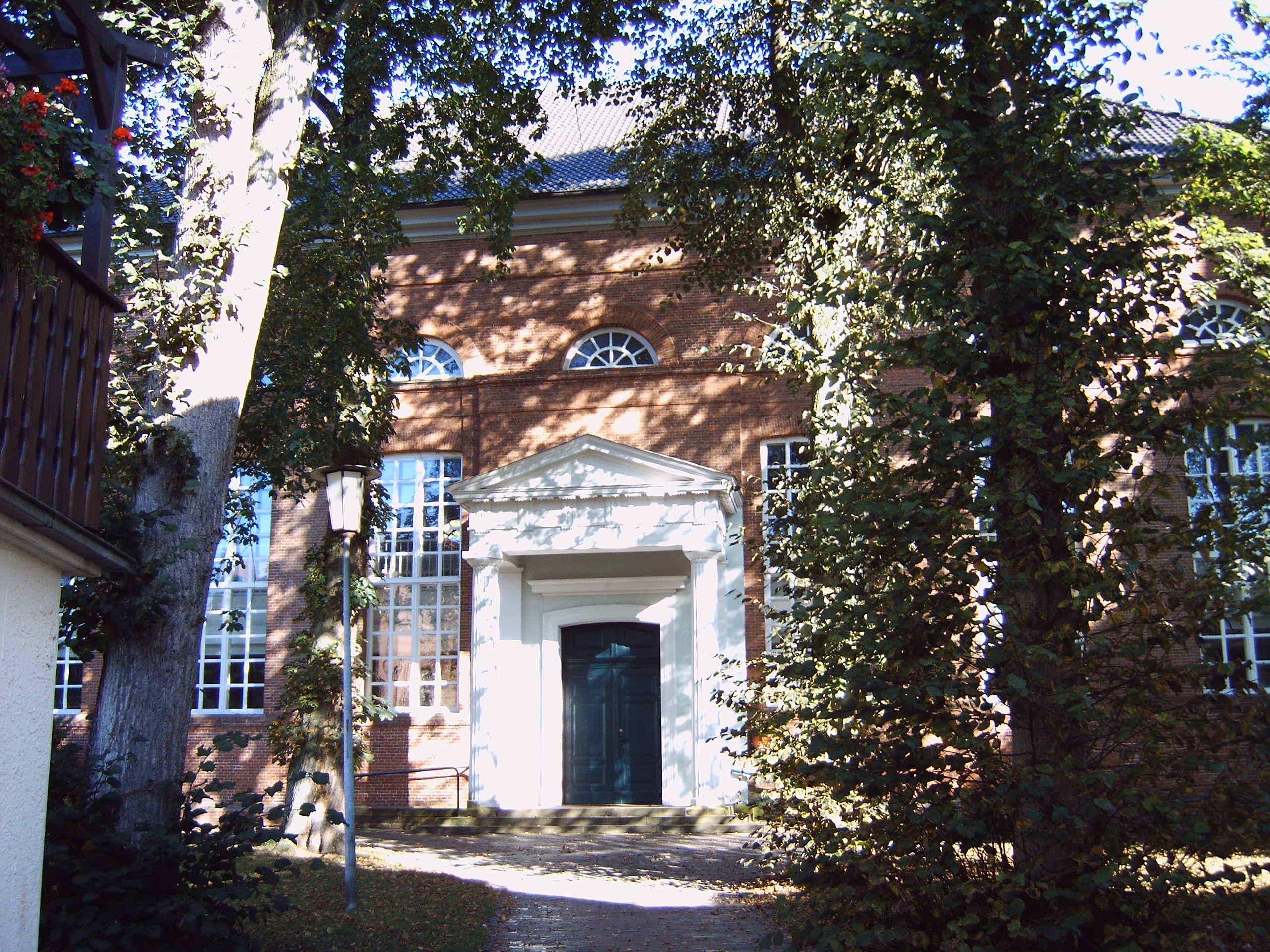 Lambertikirche Aurich, Eingang, Bild aufgenommen am 4.10.2005 von Olaf Meister